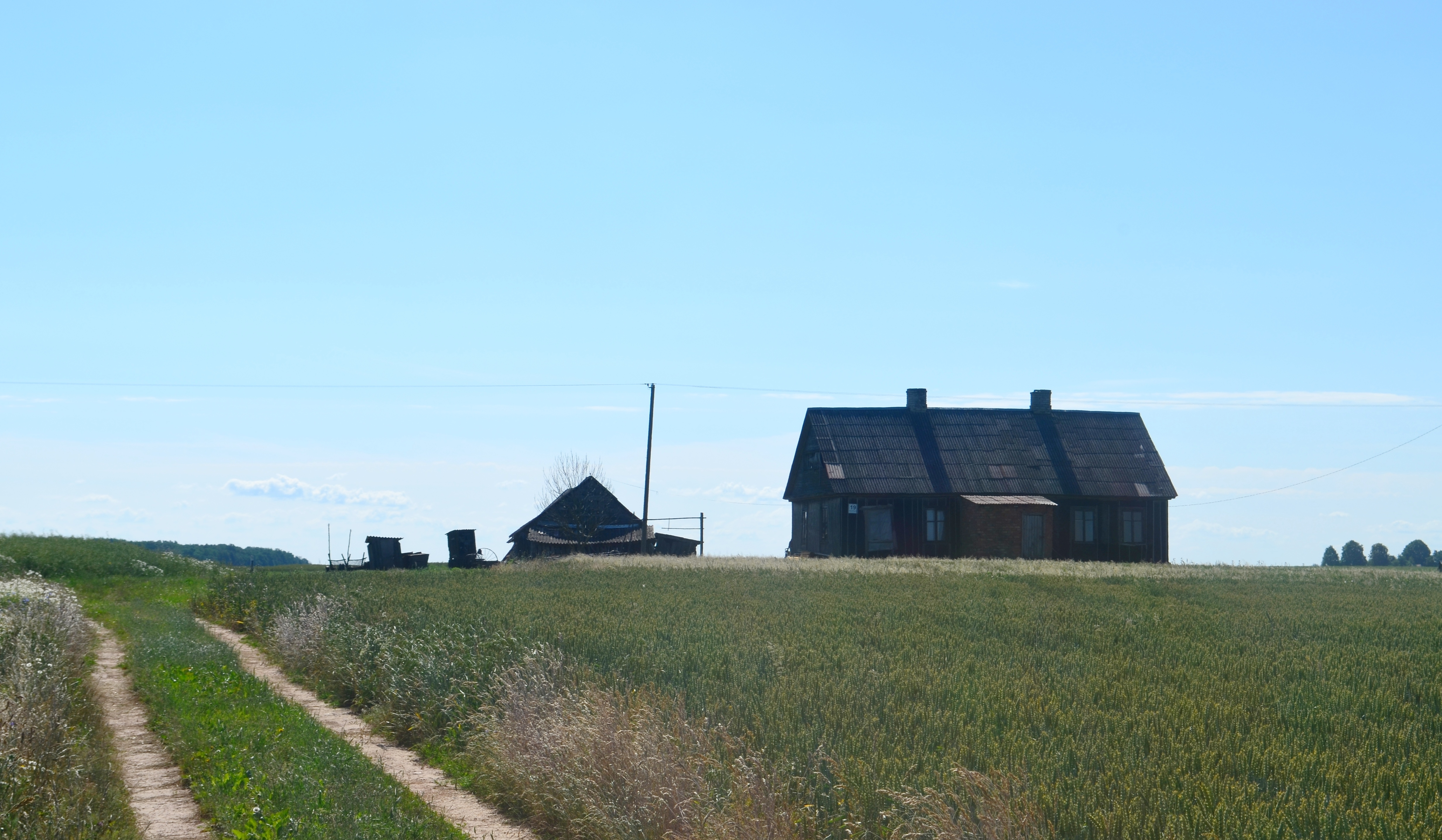 Urnėžiai, Kauno raj.